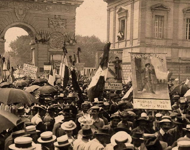 La foule des viticulteurs manifestant devant le palais de justice de Montpellier (Hérault, France).